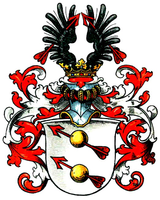 Wappen derer von Woyrsch